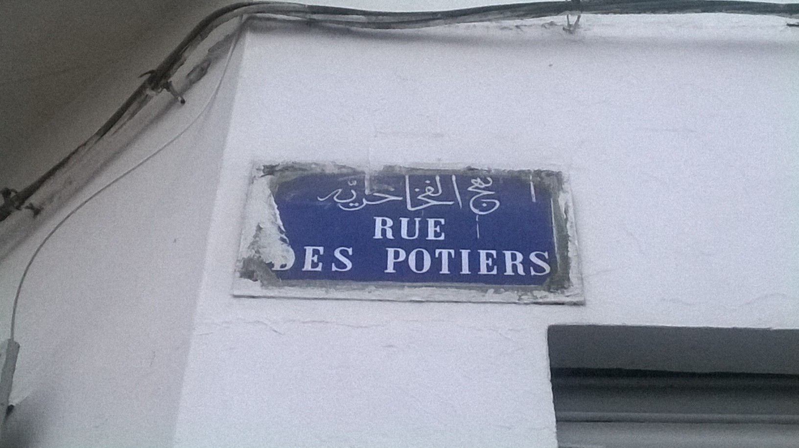 El Kallaline , Bab souika , Tunis القلالين ، باب سويقة ، تونس